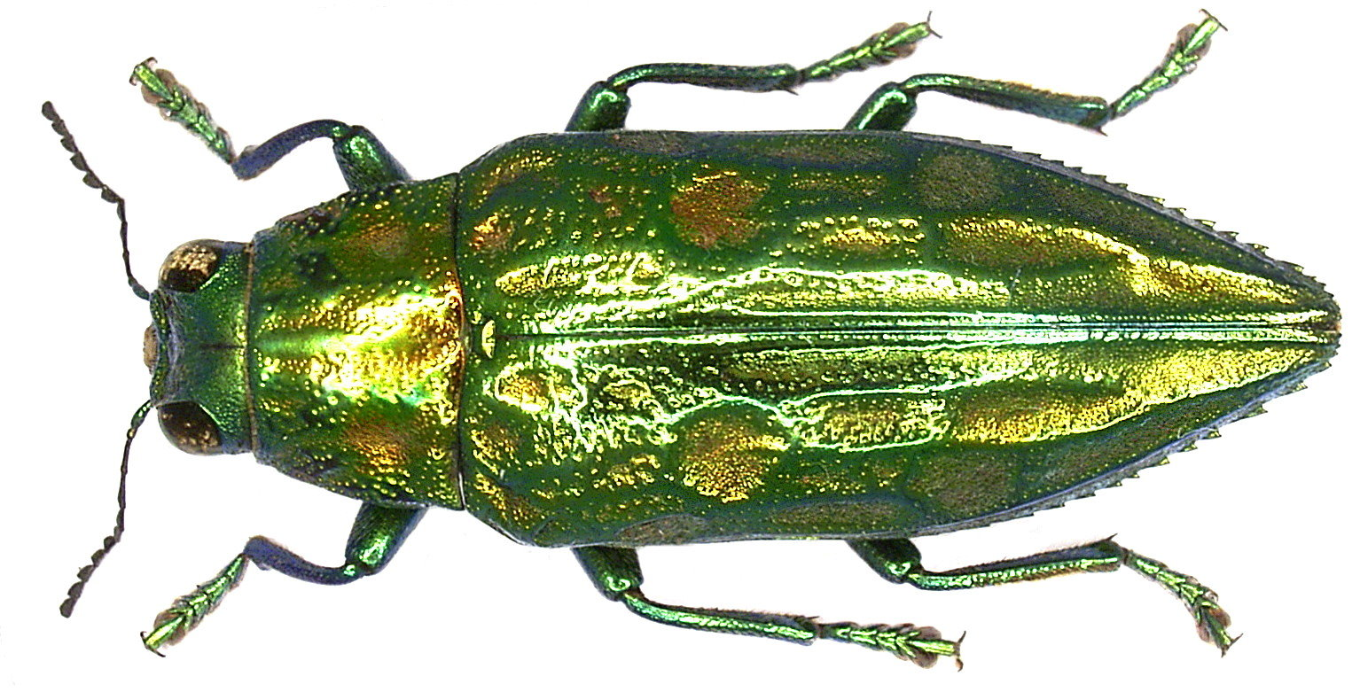 Familie: Buprestidae Groesse: 27 mm Fundort: Indonesien, Irian Jaya, Raja Ampat-Prov., Batanta Isl., Waywesar leg. A.Skale, 2004; det. Niehuis Paratypus Photo: U.Schmidt, 2006